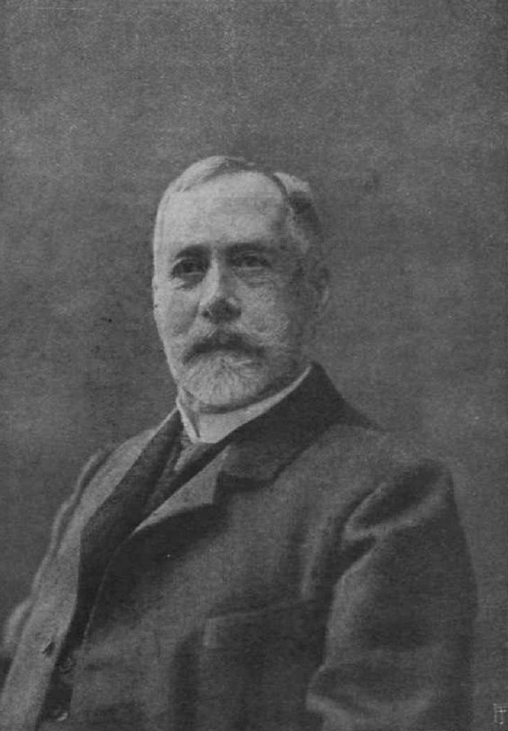 Portrait of Pál Szinyei Merse